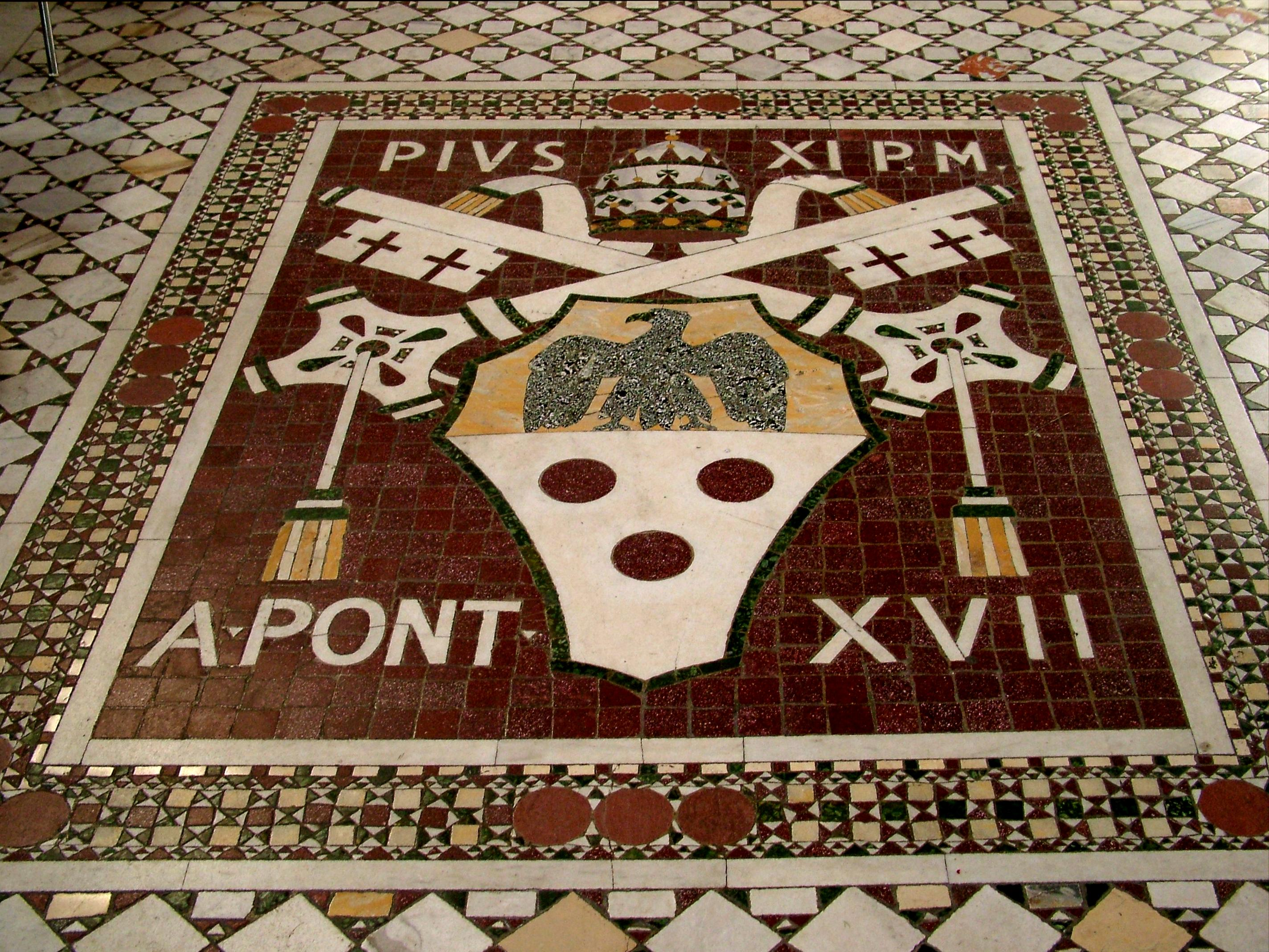 Cosmata padlóburkolat